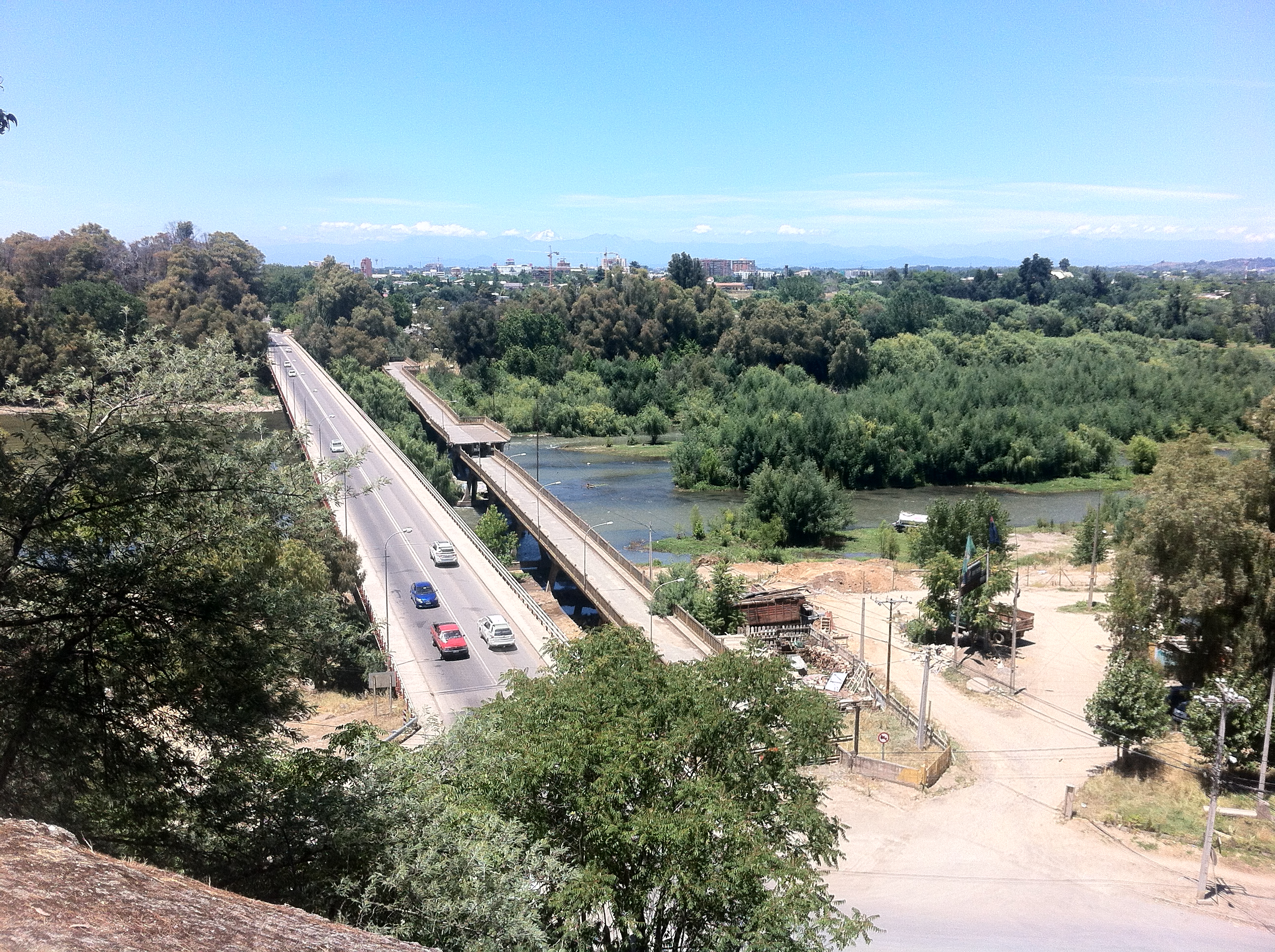 Acceso a la ciudad desde el poniente. Puente sobre río claro